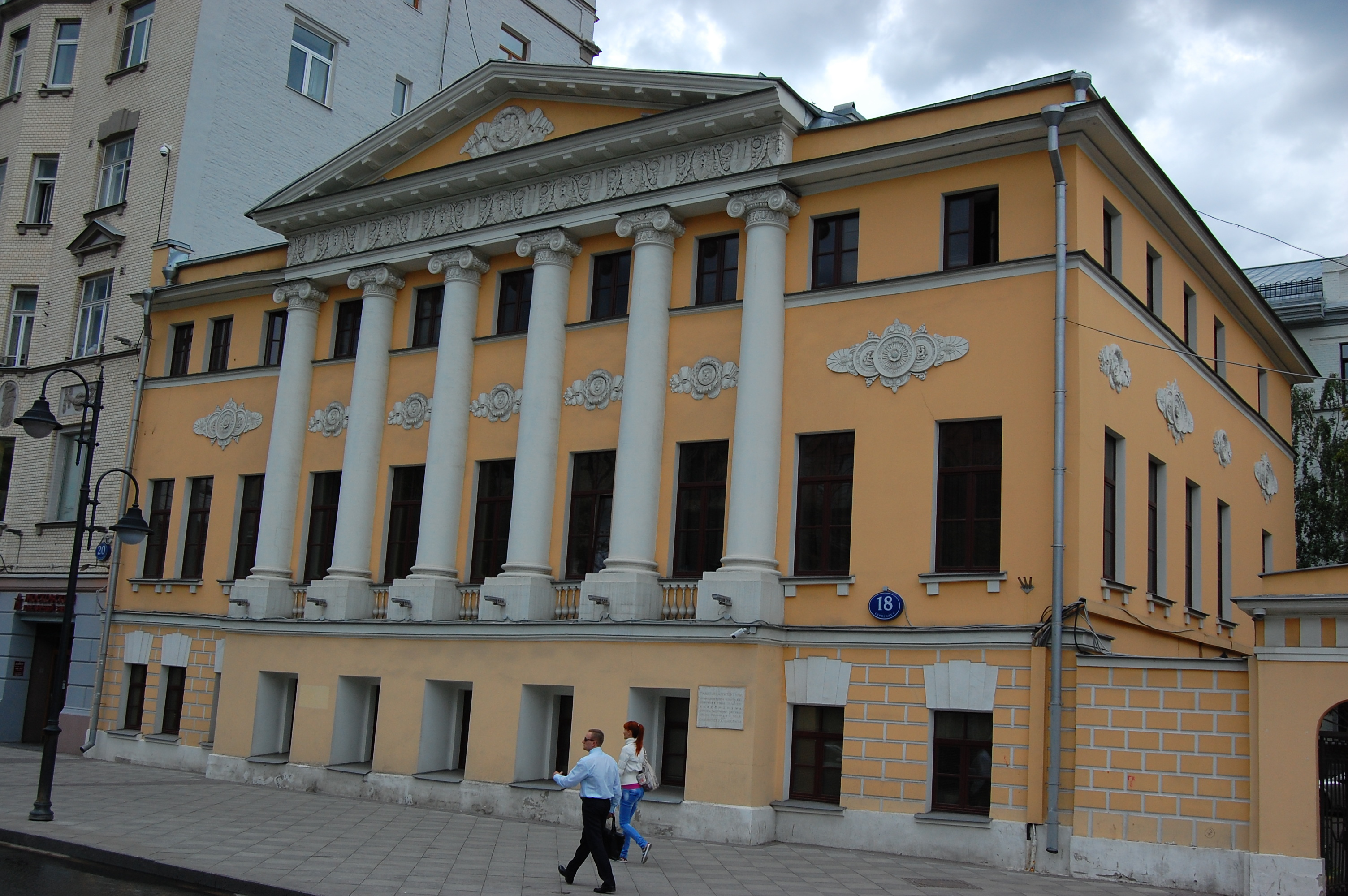 Усадьба Ф. Б. Лепешкина — Демидова, усадебный дом